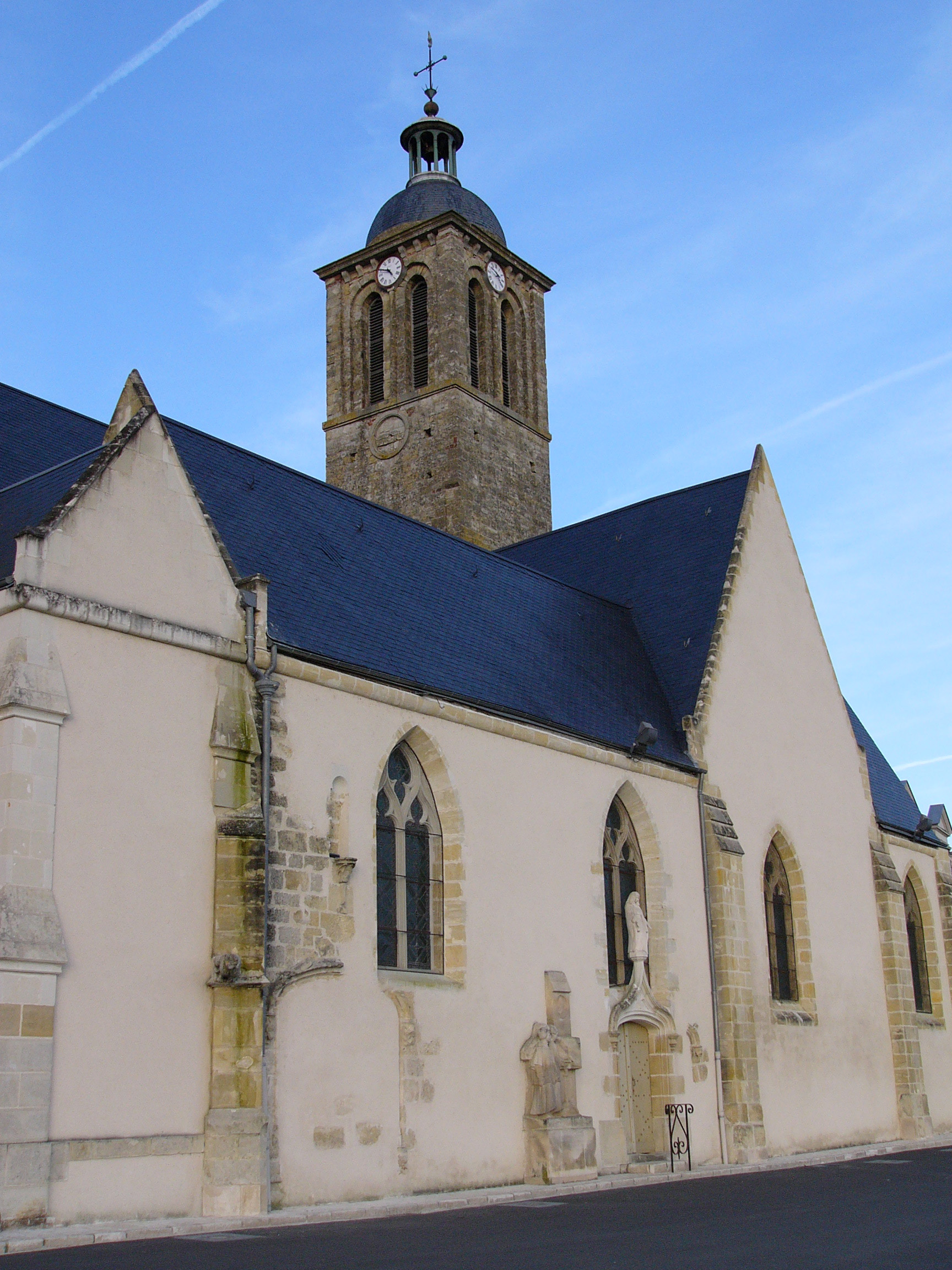 Vouvray (Indre-et-Loire, France) : l'église